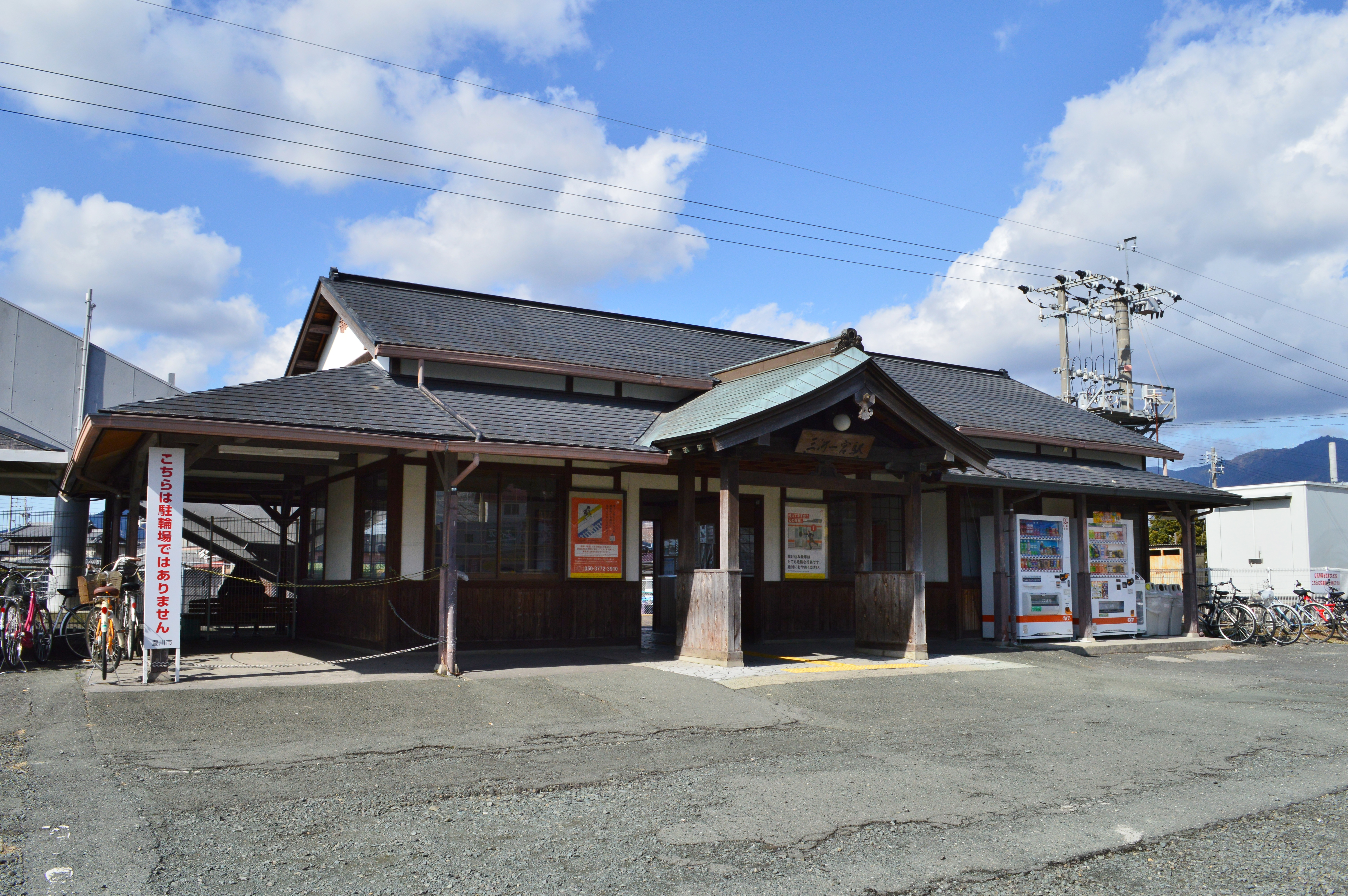 三河一宮駅 駅舎 Nikon D3200